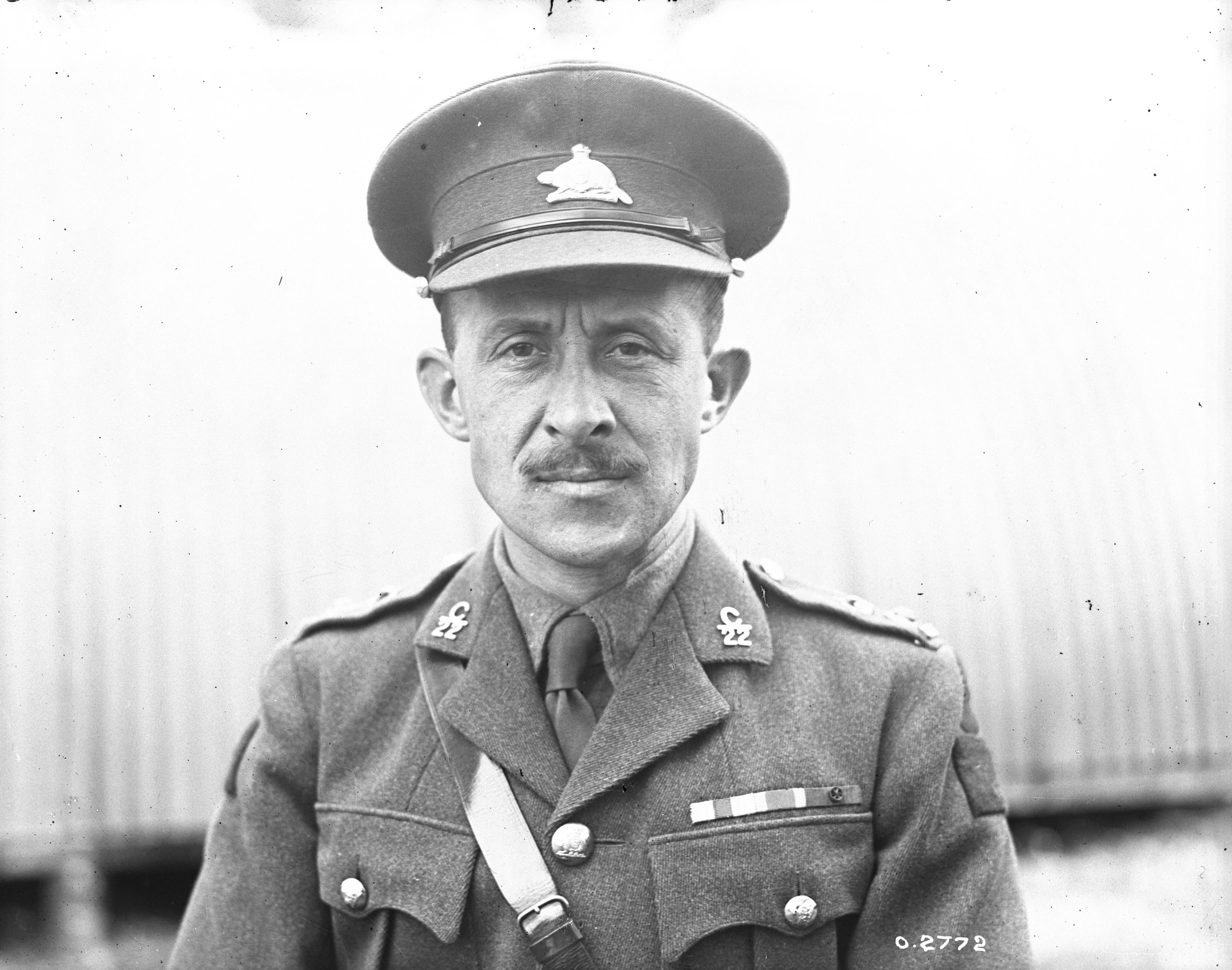 Lieutenant-colonel Thomas-Louis Tremblay «À 11.30 je reçois ordre de me rapporter à la Brigade immédiatement. Vers une heure moins quart, le Brigadier [-général] arrive et nous informe McKenzie du 26ième et moi que la Brigade a ordre d’attaquer cet après-midi et de s’emparer de Courcelette; les deux autres commandants de [bataillons] ne sont pas encore arrivés. Je réclame l’attaque pour mon bataillon, et le Brigadier décide après une petite hésitation que l’attaque va se faire par le 22e à droite le 25e à gauche, que le 26e sera en support, le 24e en réserve...»